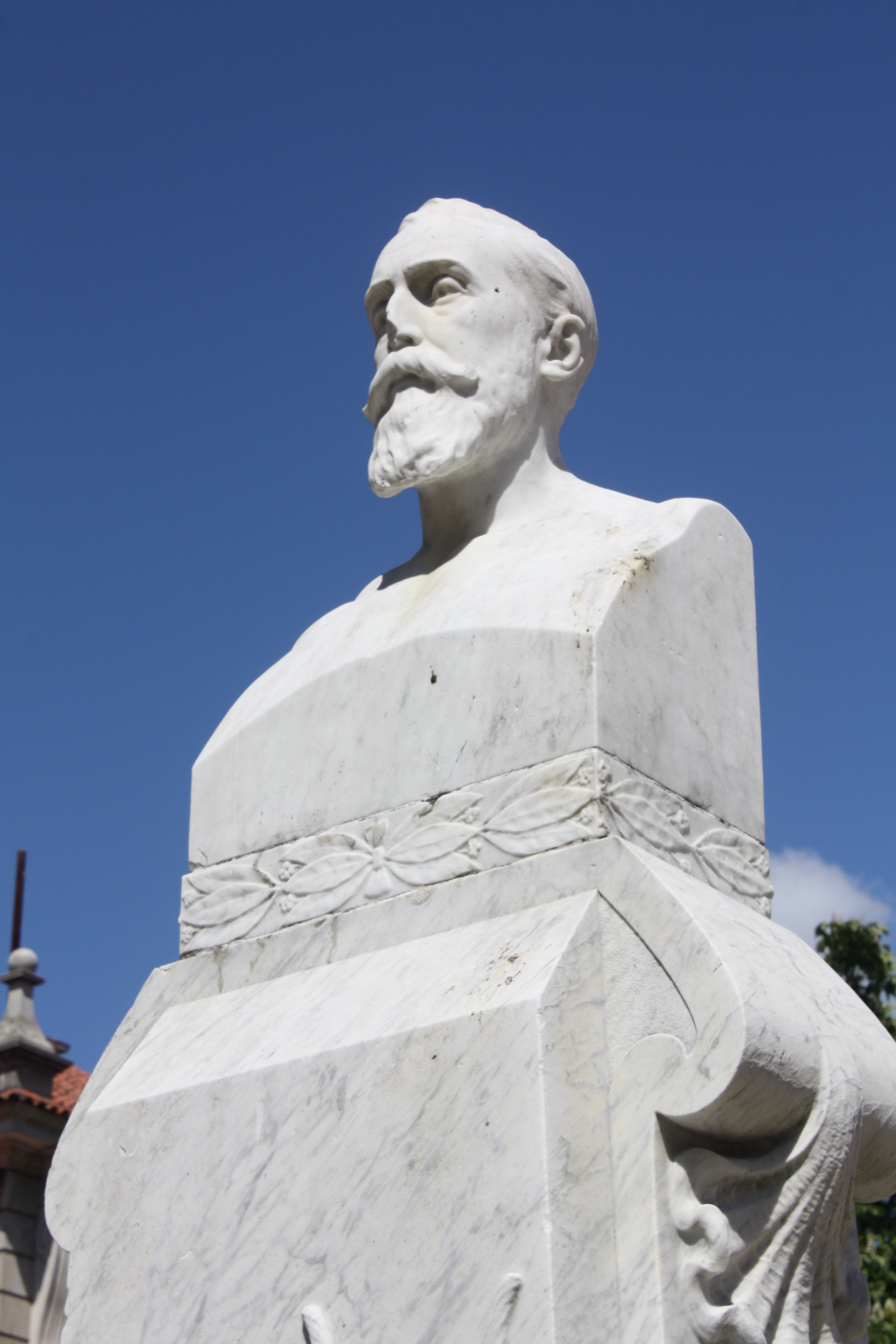 Estatua a Curros Enríquez (A Alameda, Vigo)